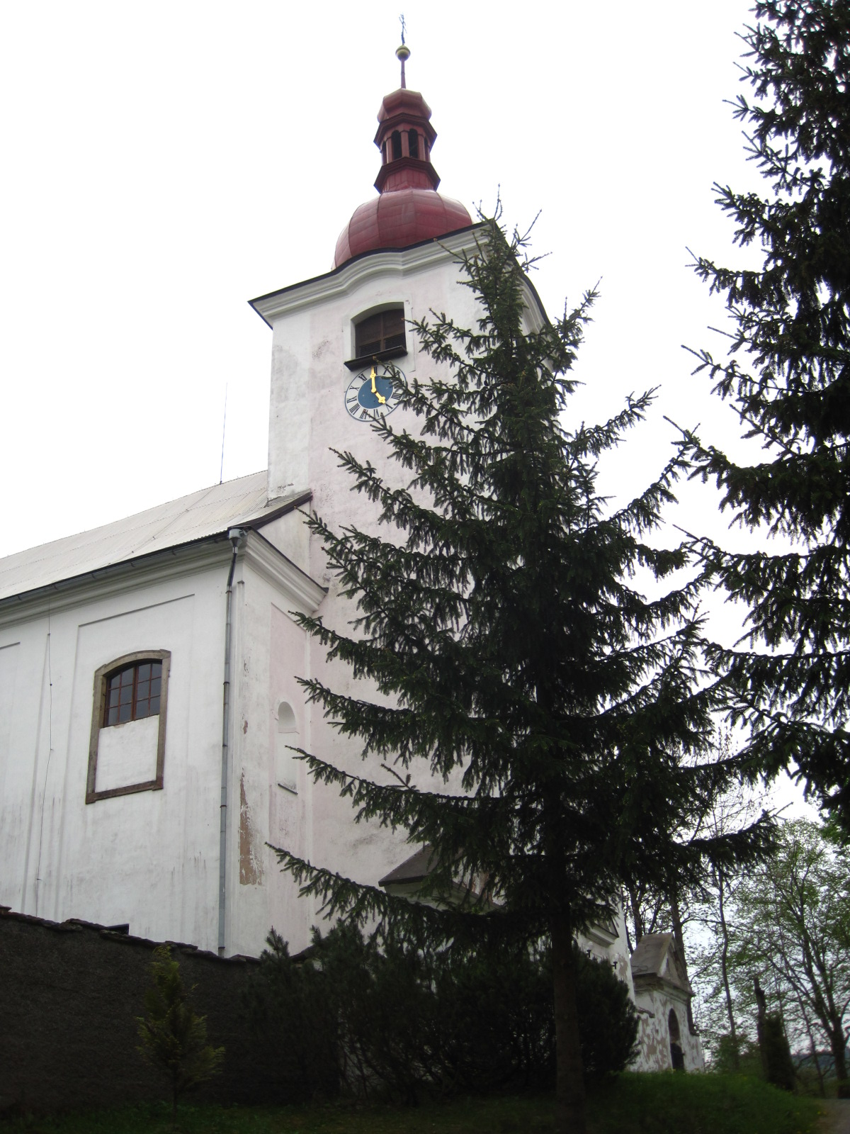 Kostel Všech svatých, Sedloňov.